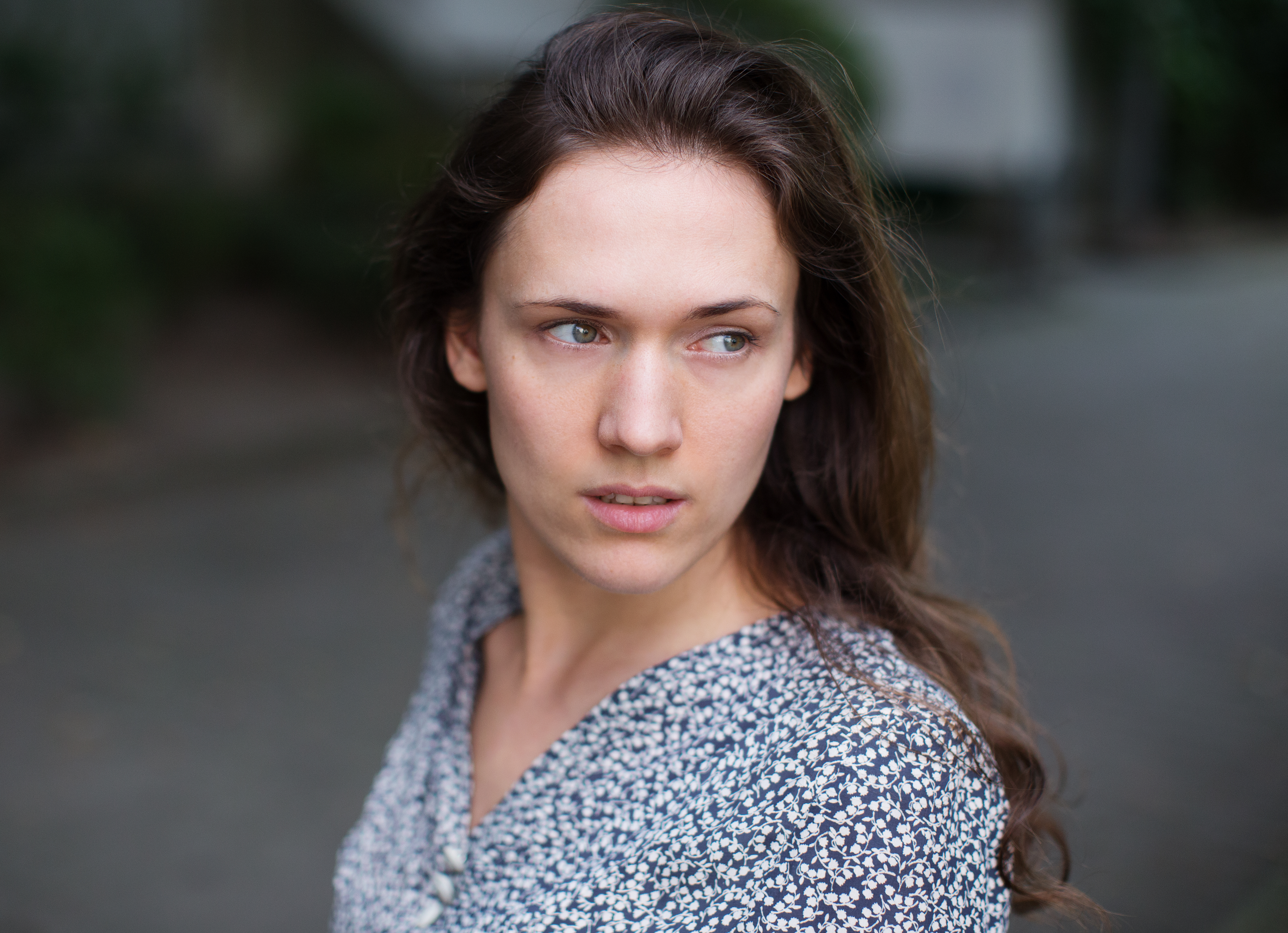 © Hannes Caspar